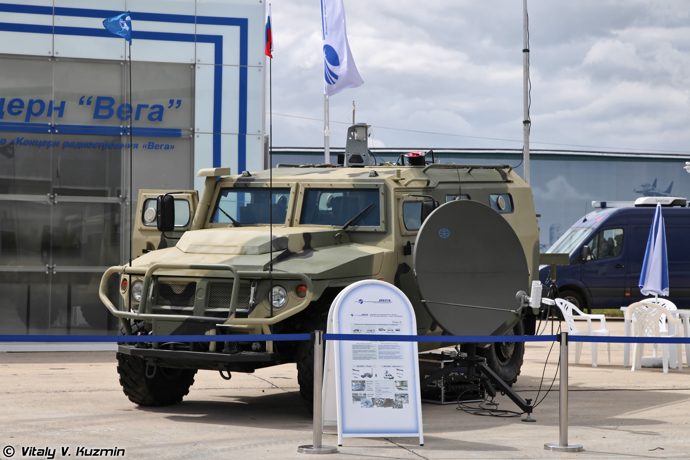 Мобильный комплекс МК–БЛА-01 (UAV system MK-BLA-01)